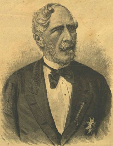 Vay Miklós magyar államférfi, főispán, főrendiházi elnök, koronaőr, országgyűlési képviselő, református főgondnok, MTA igazgató tag.